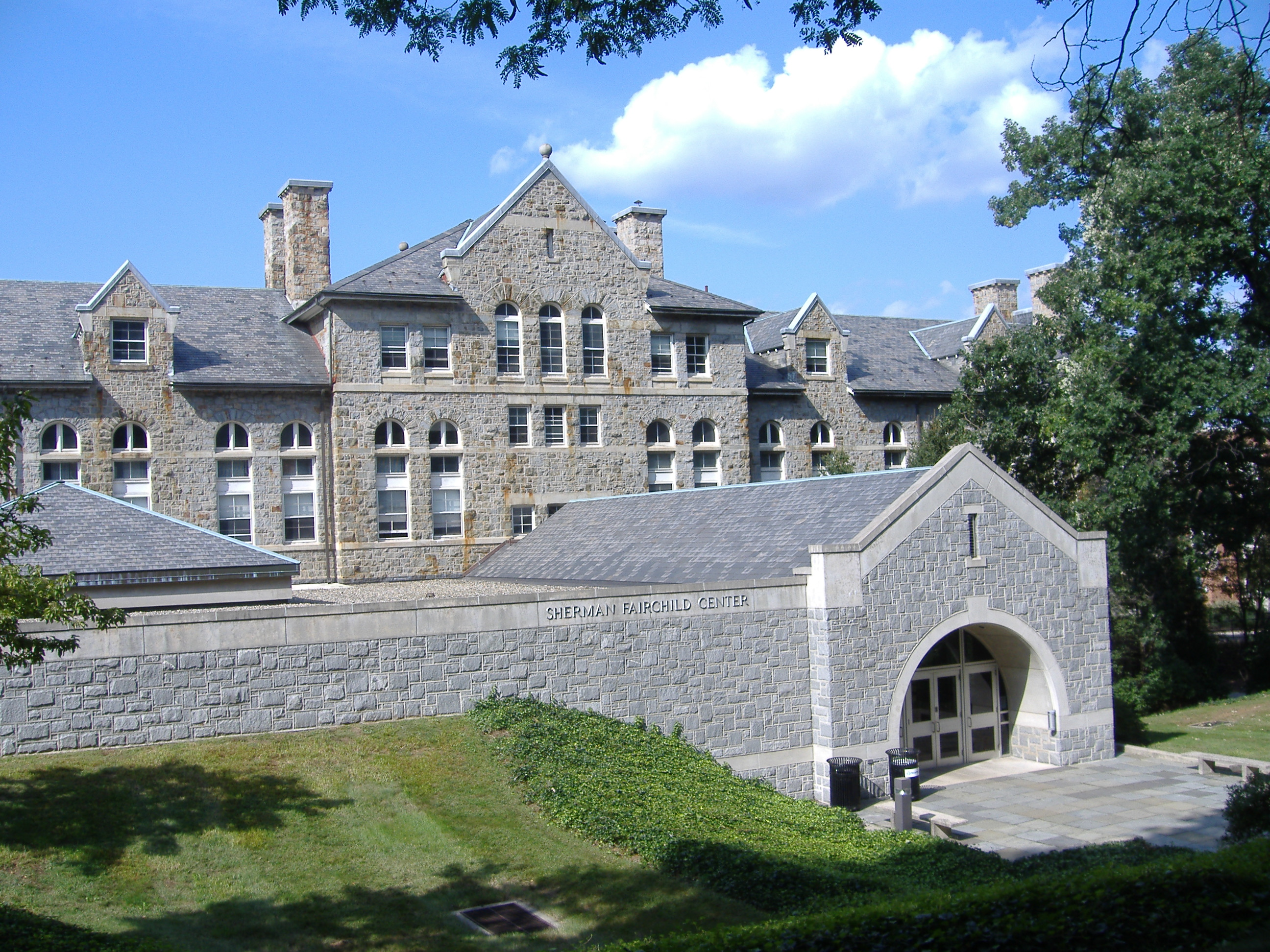 Lewis Lab